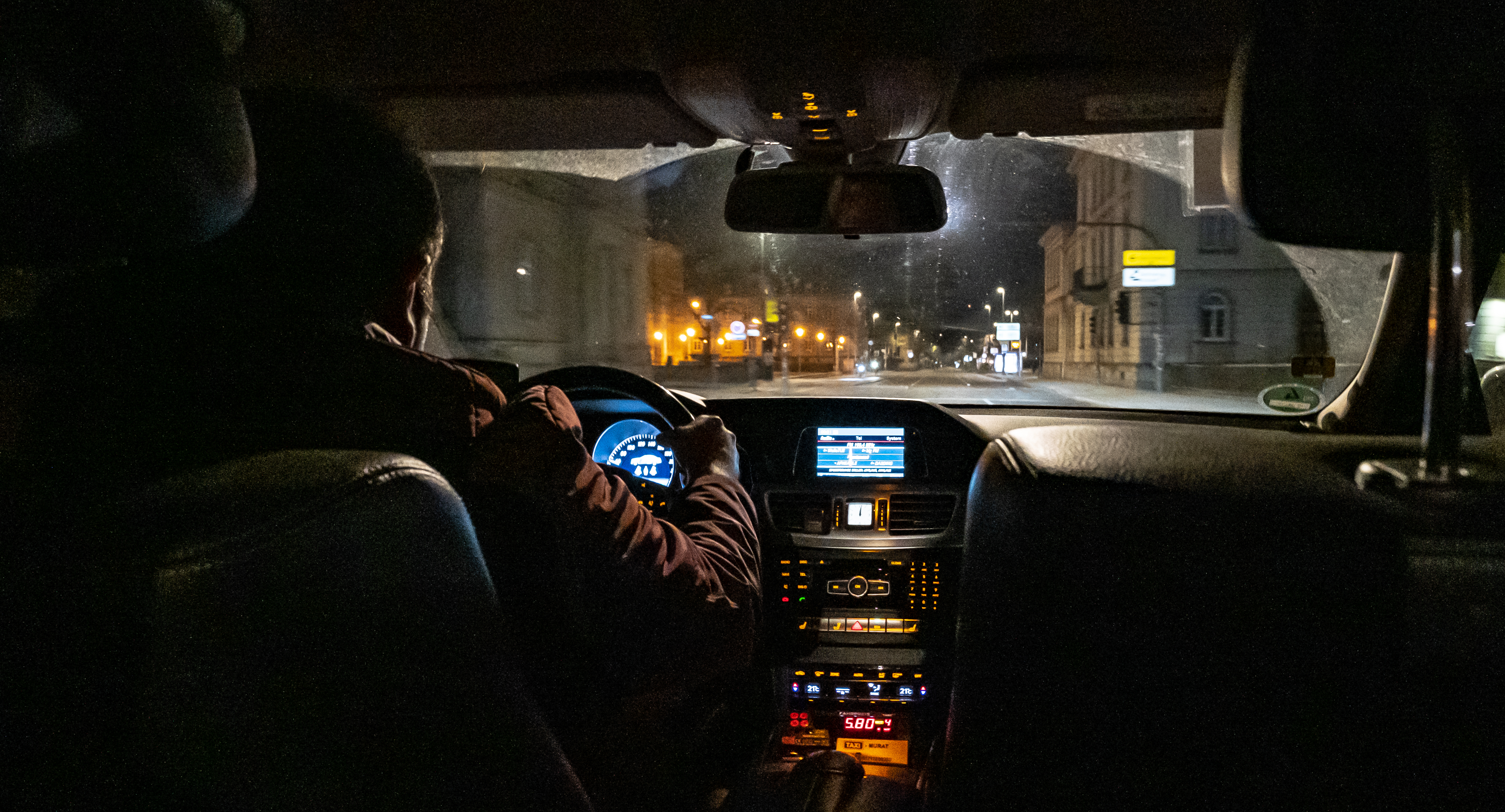 Taxi in Tübingen in der Wilhelmstraße